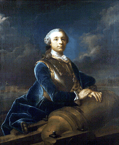 Augustin Ehrensvärd (1710-1772)